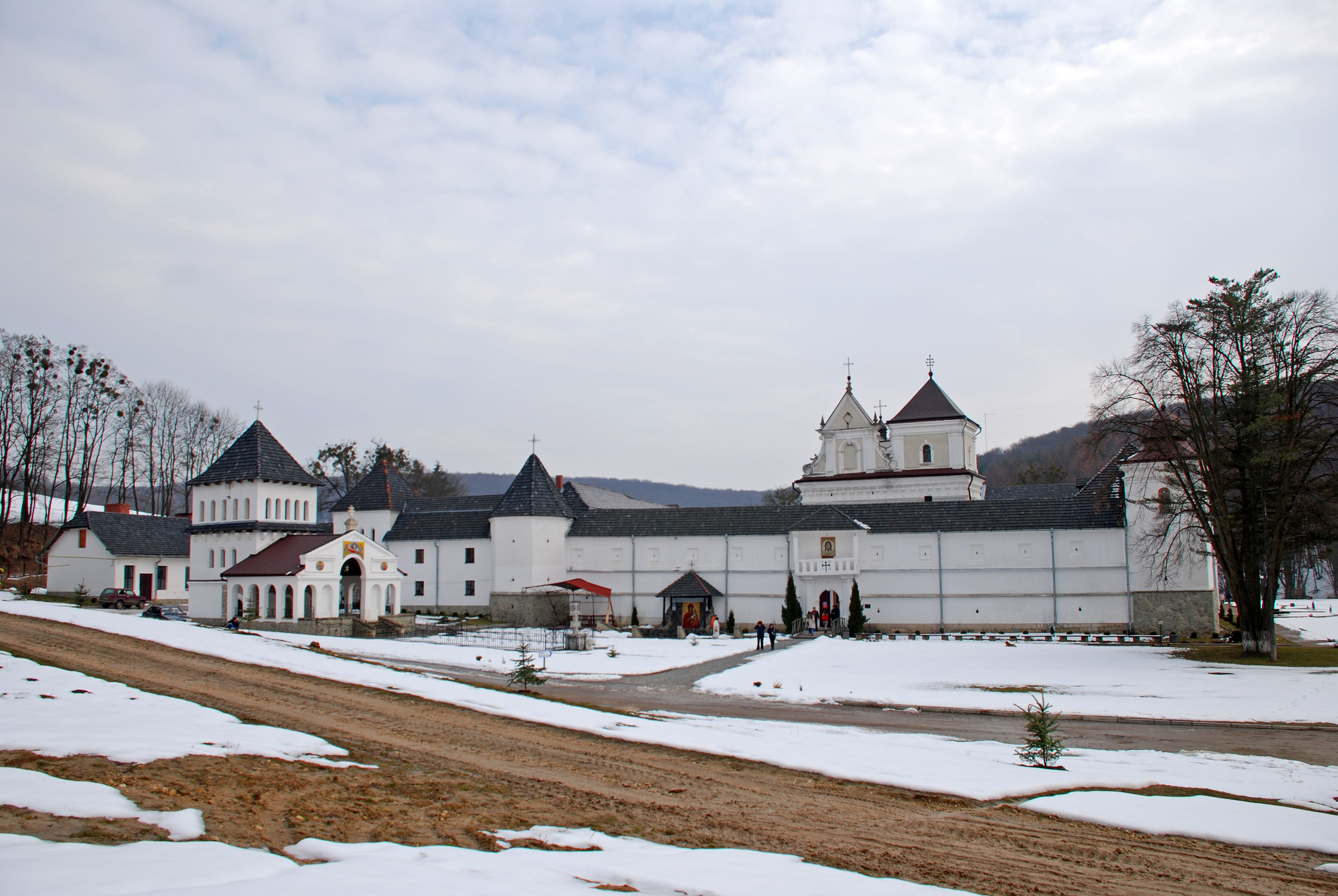 Унівський монастир-фортеця (мур.), с.Унів (Міжгір'я)